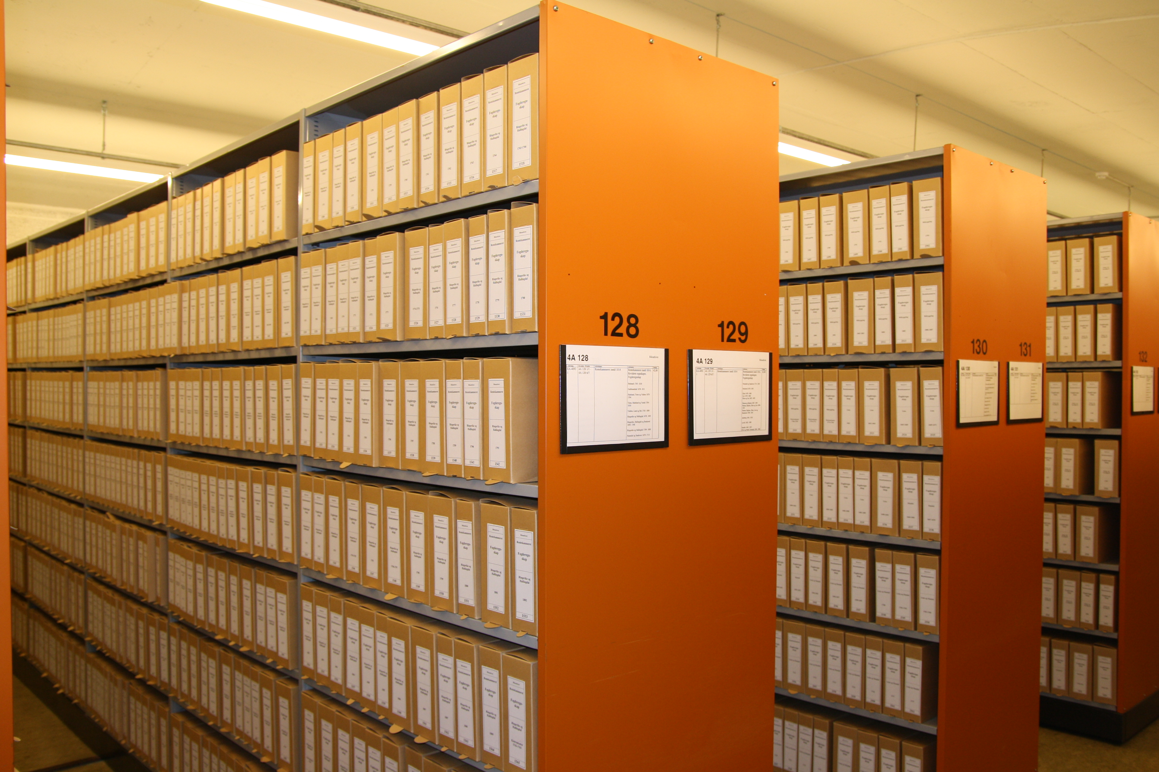 Old local accounts in The National Archives.